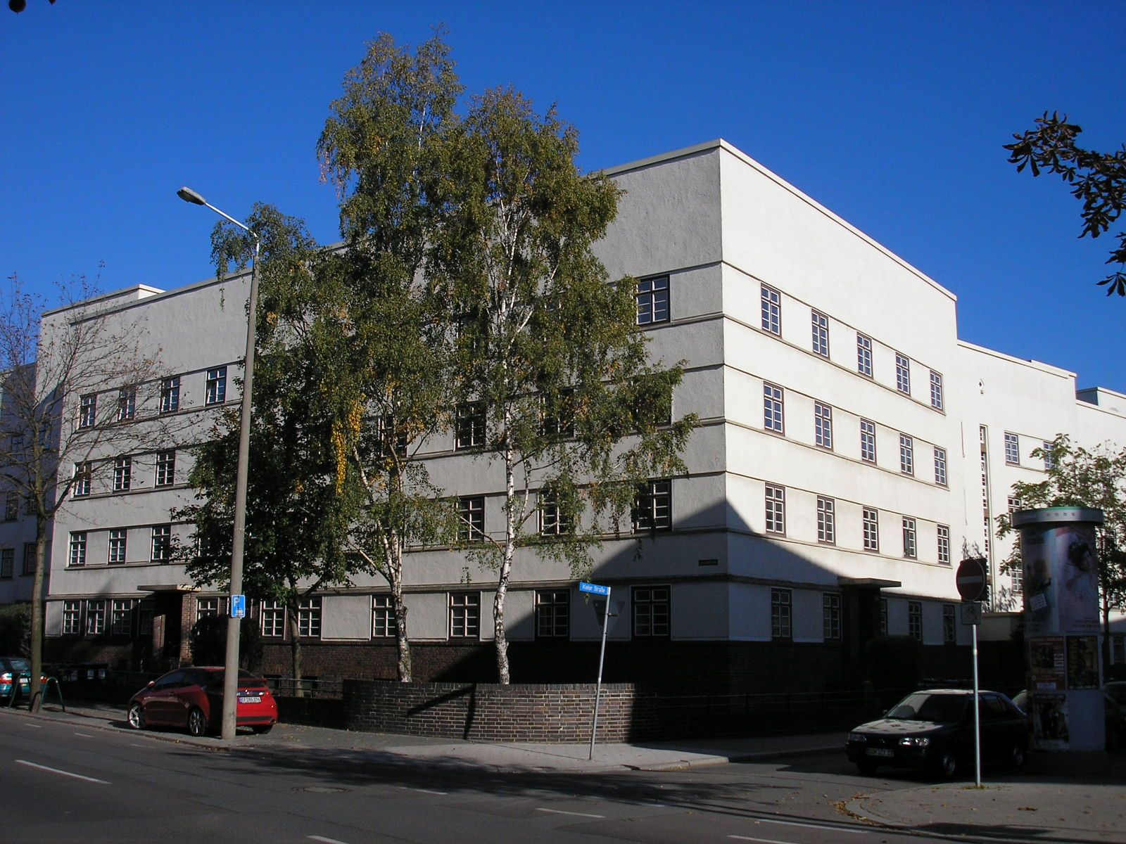 Ein Wohnblock von 1929 in der Krämpfervorstadt in Erfurt.